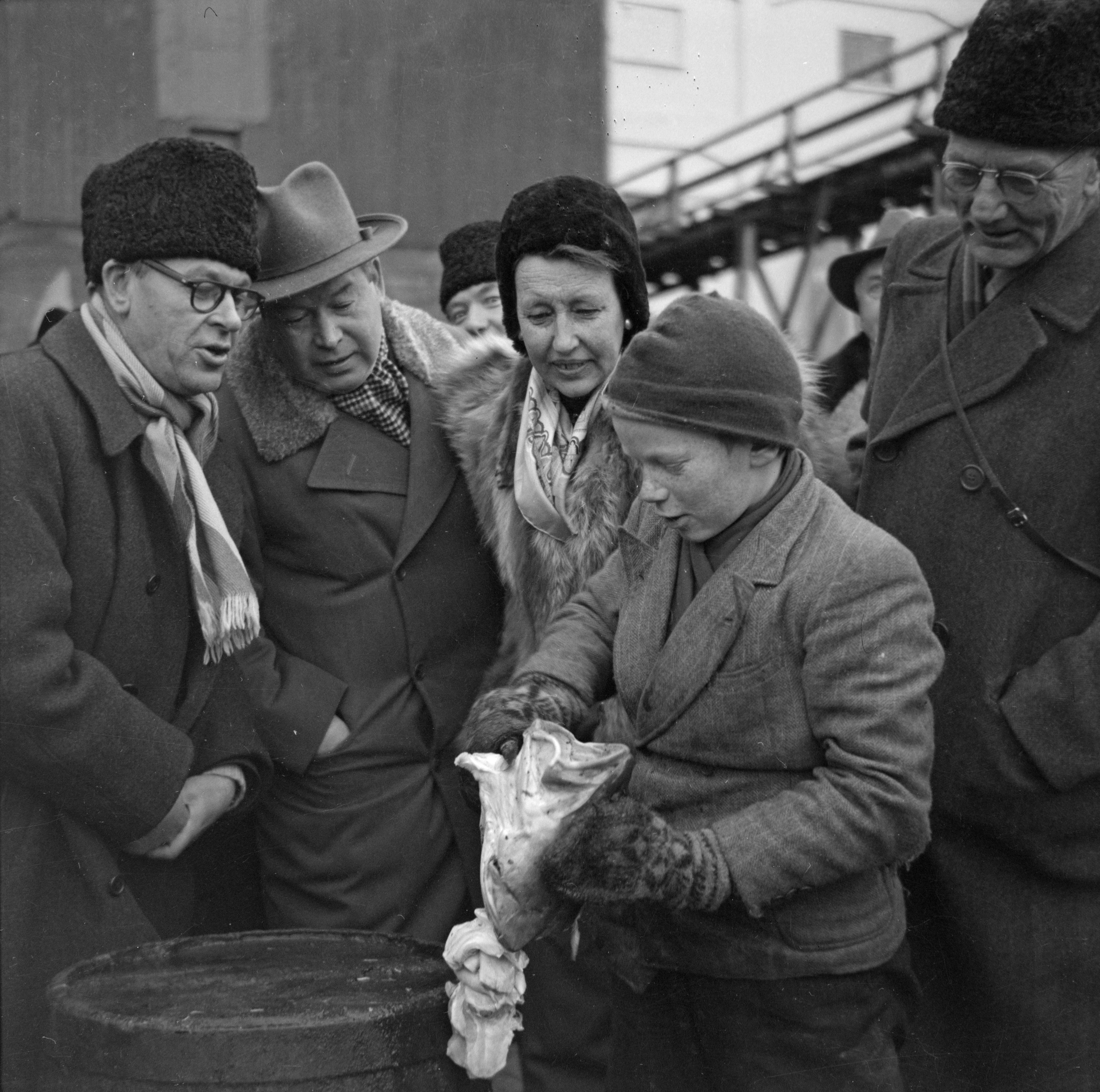 Bildet er hentet fra Nordlandsmuseet bildesamling etter Kanstad. Skjæring av torsketunger i Svolvær. Motivbeskrivelse: Gruppebilde Nøkkelord: Levnetsbeskrivelser Ungdom